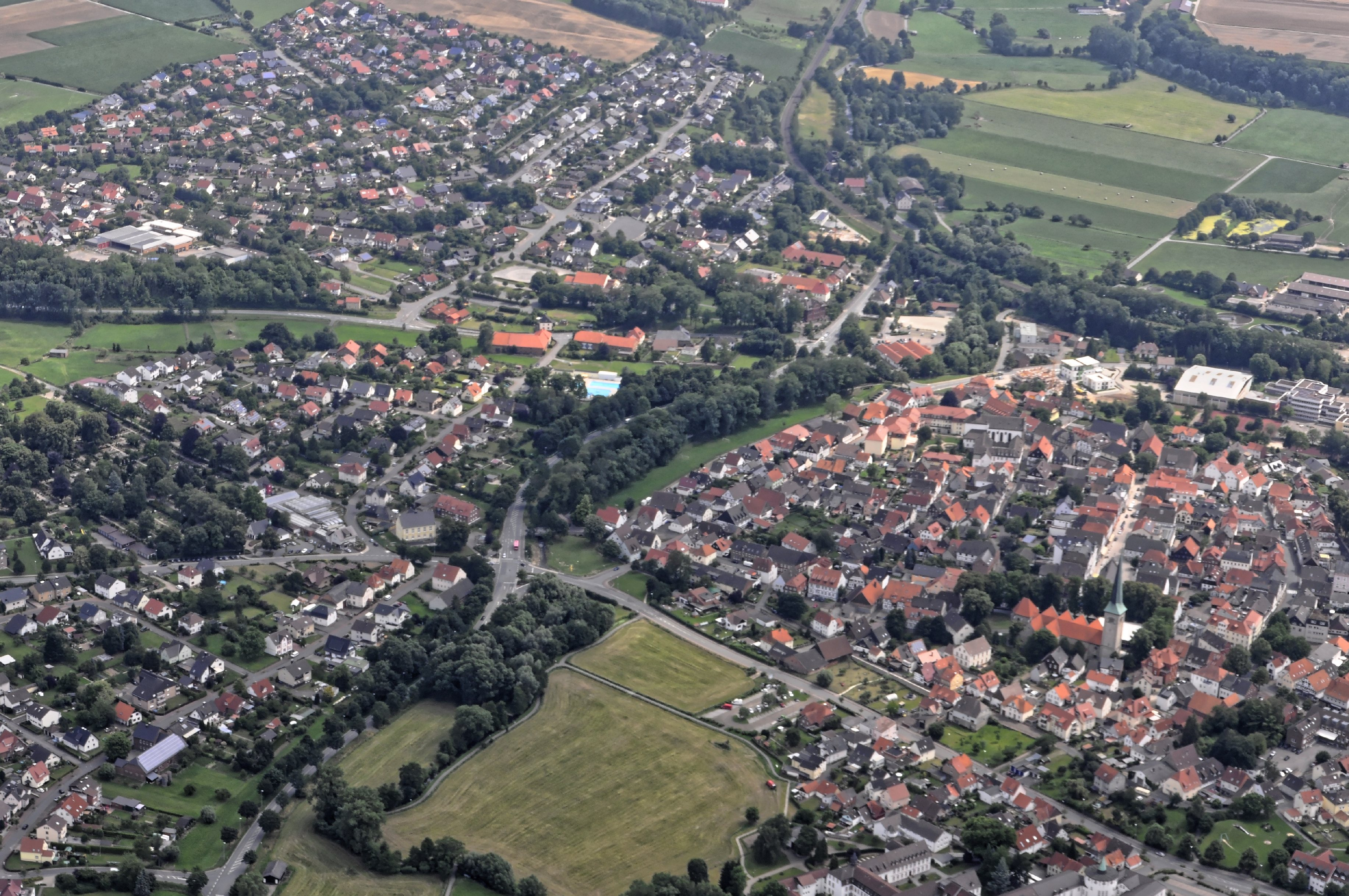 Bilder vom Flug Nordholz-Hammelburg 2015: Brakel